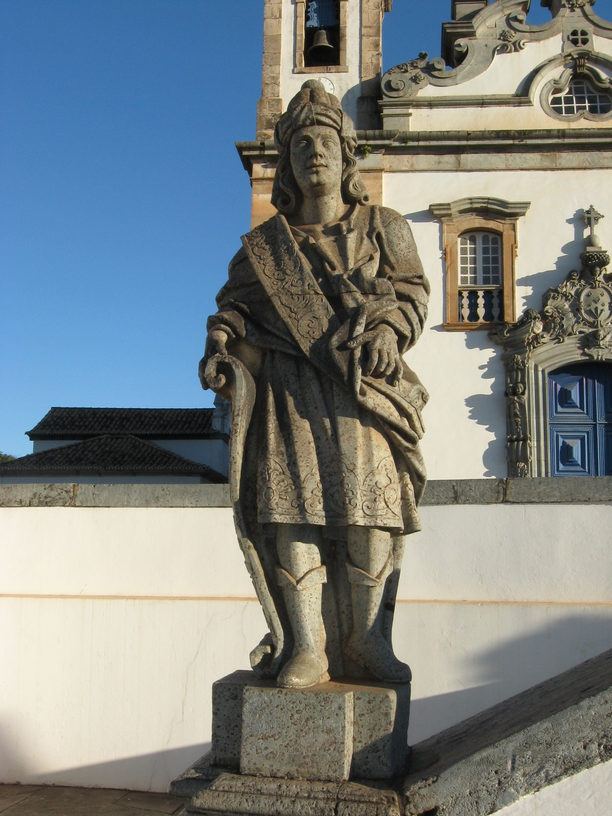 Profeta Baruc - Doze profetas de Aleijadinho Congonhas Minas Gerais